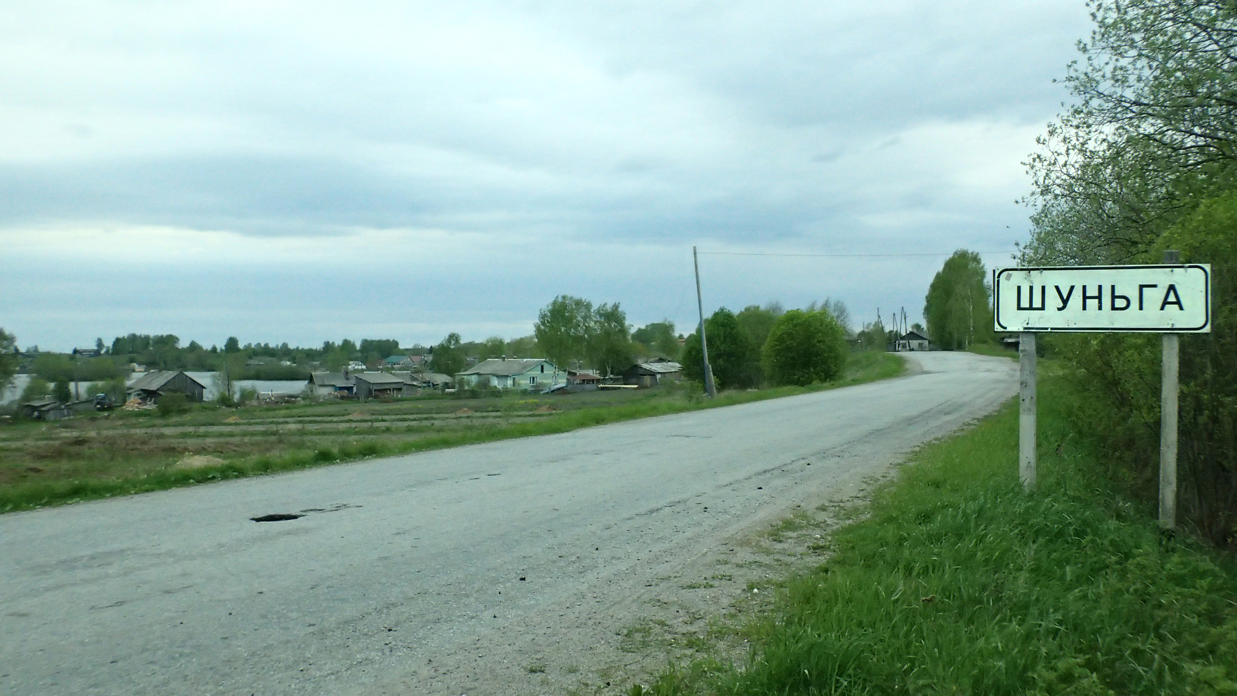 Село Шуньга Республика Карелия. Южный въезд